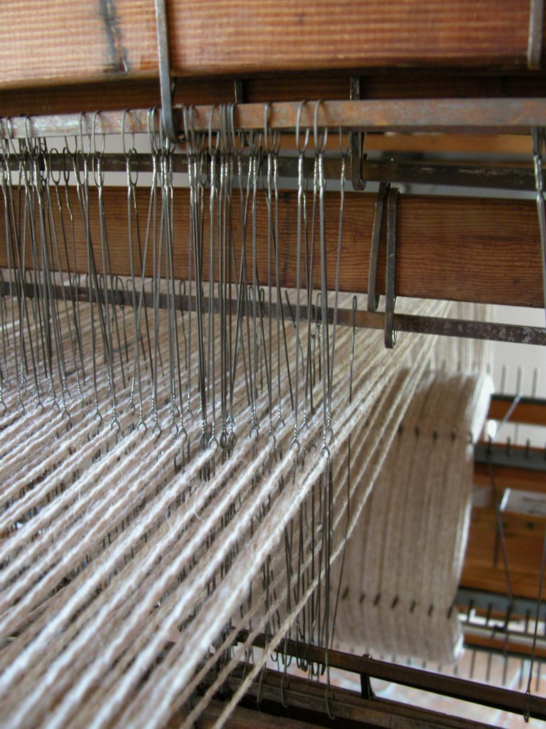 foto mia personale, fili di ordito passano nei licci, 2007 Licensing Categoria:Immagini sulla tessitura